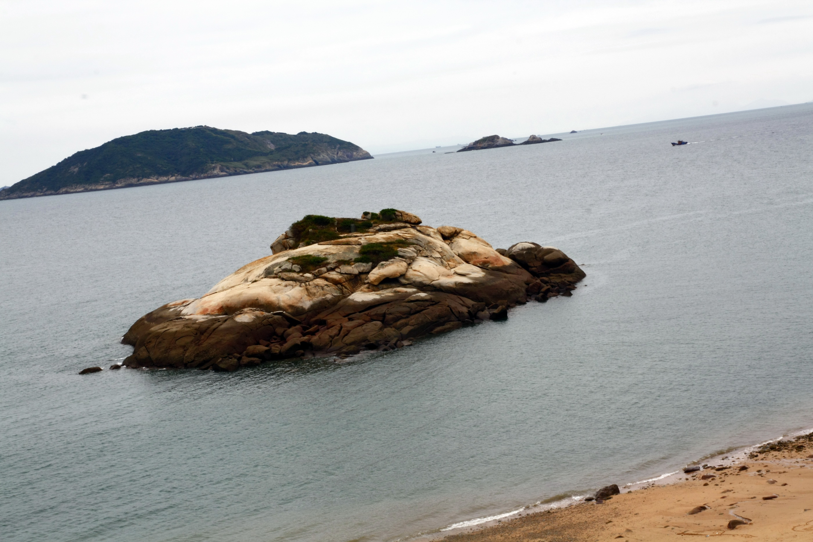 2013_0815 馬祖_北竿17 Beigan, Lienchiang